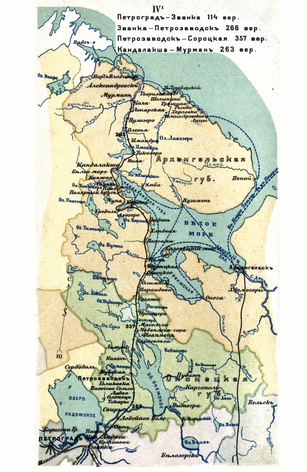 Мурманская ж/д